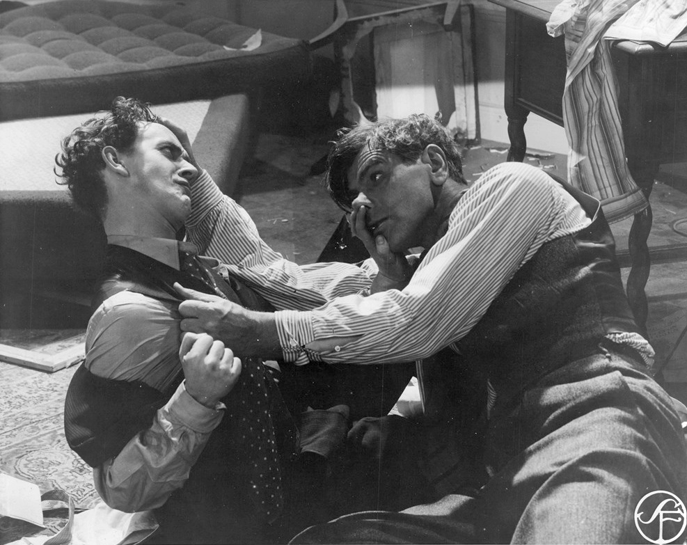 "Ryska snuvan", 1937. Åke Söderblom och Edvin Adolphson. Fj 10/37.